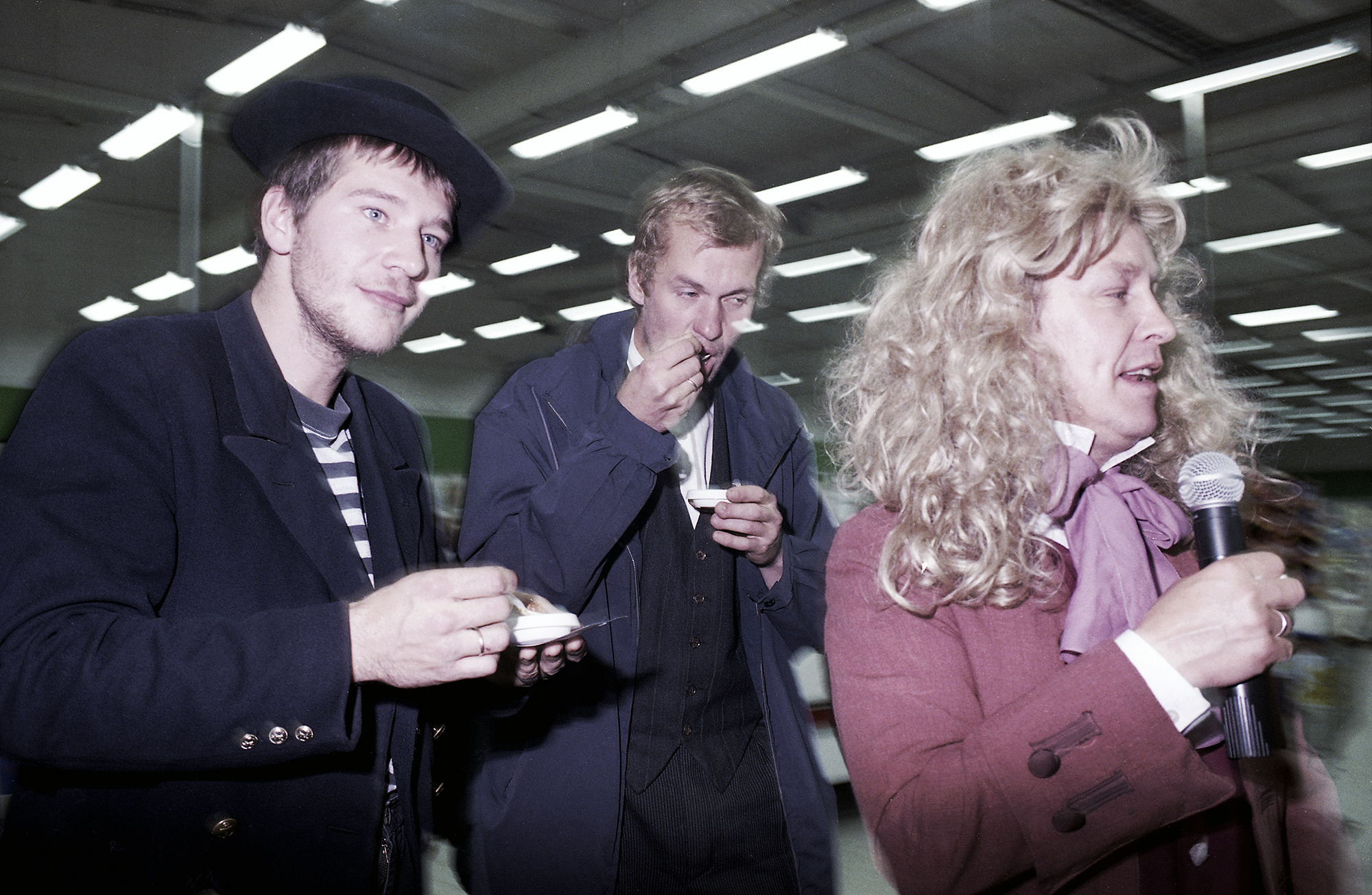 Marko Matvere, Jaan Tätte ja Lauri Nebel 96